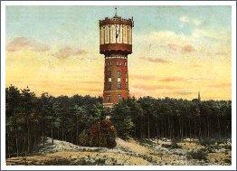 Der Wasserturm in Hamburg-Lohbrügge im Jahre 1907